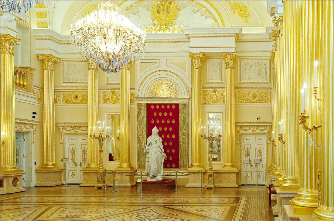 Екатерининский зал Большого дворца. Tsaritsyno